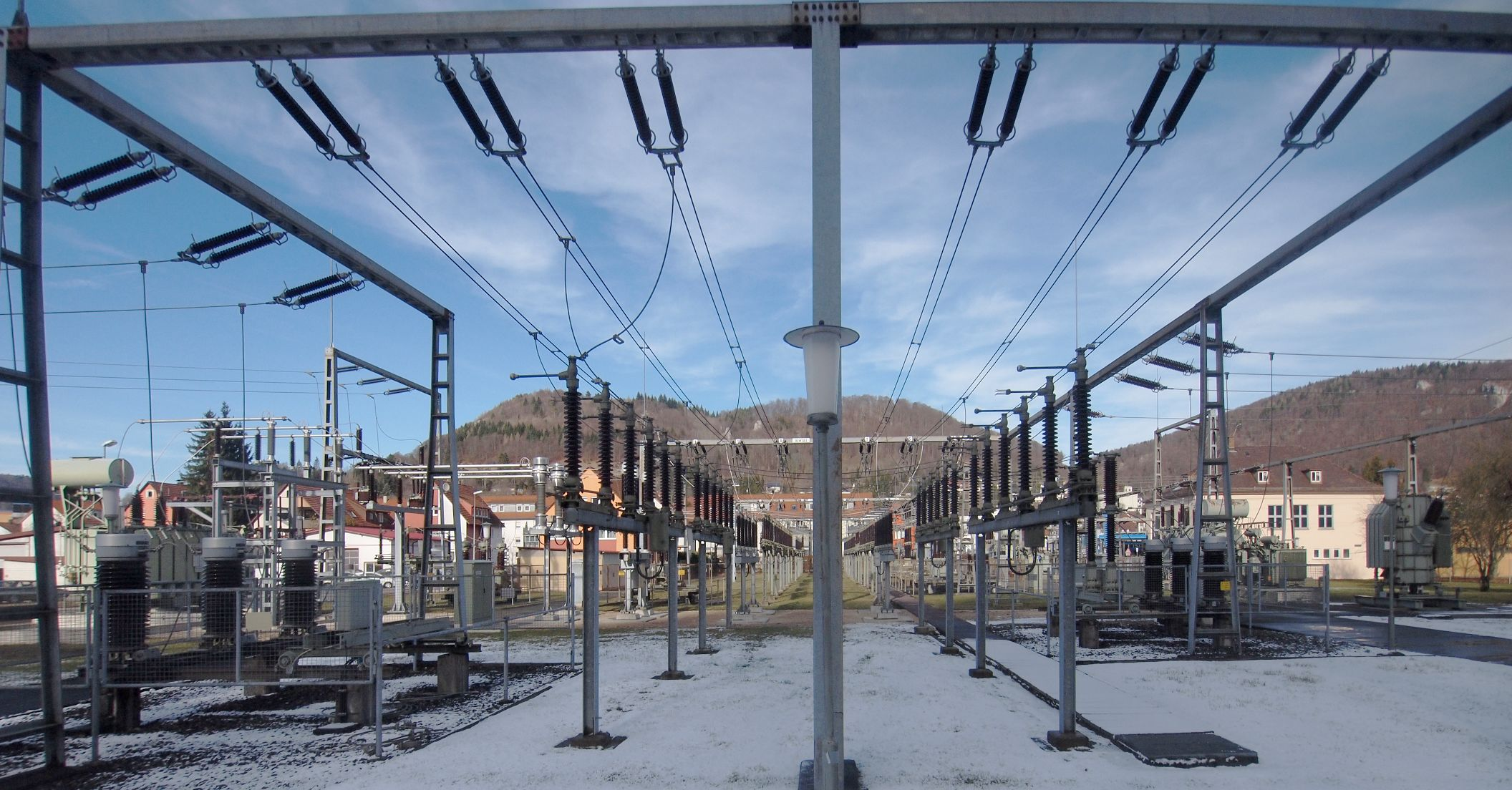 Sammelschienen im 110-kV-Umspannwerk Ebingen (Netze BW)